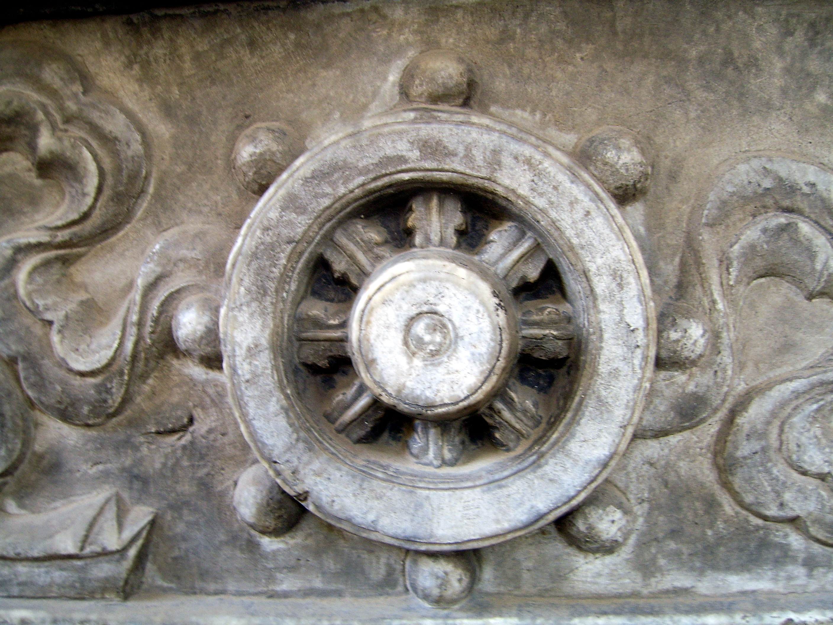 石刻法轮，于北京景山公园